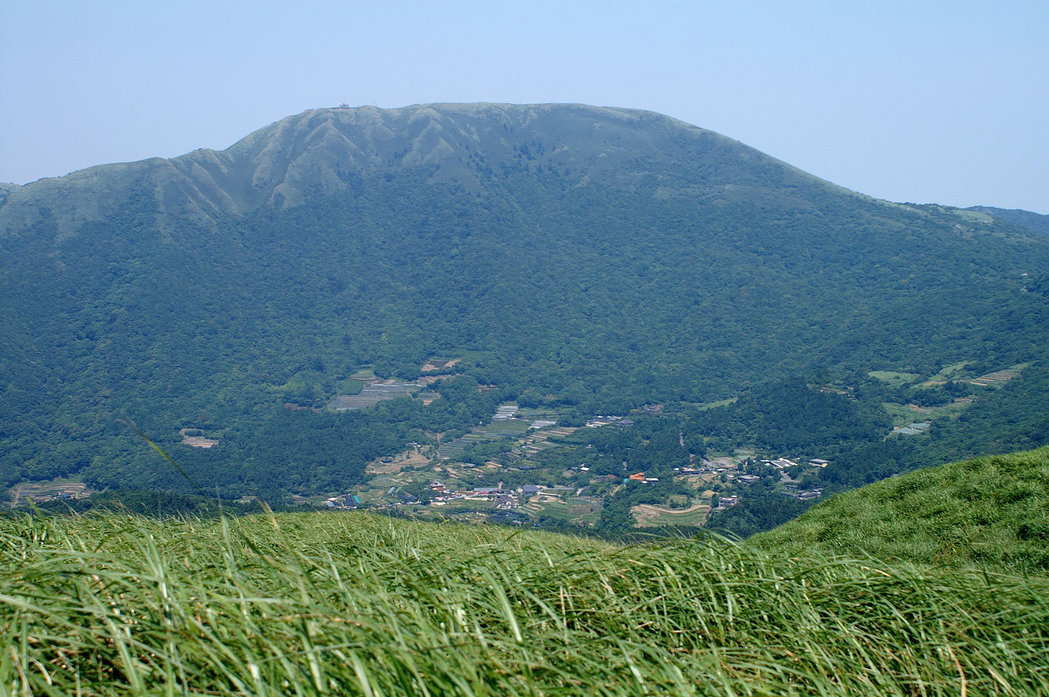 中文（台灣）: 大屯山